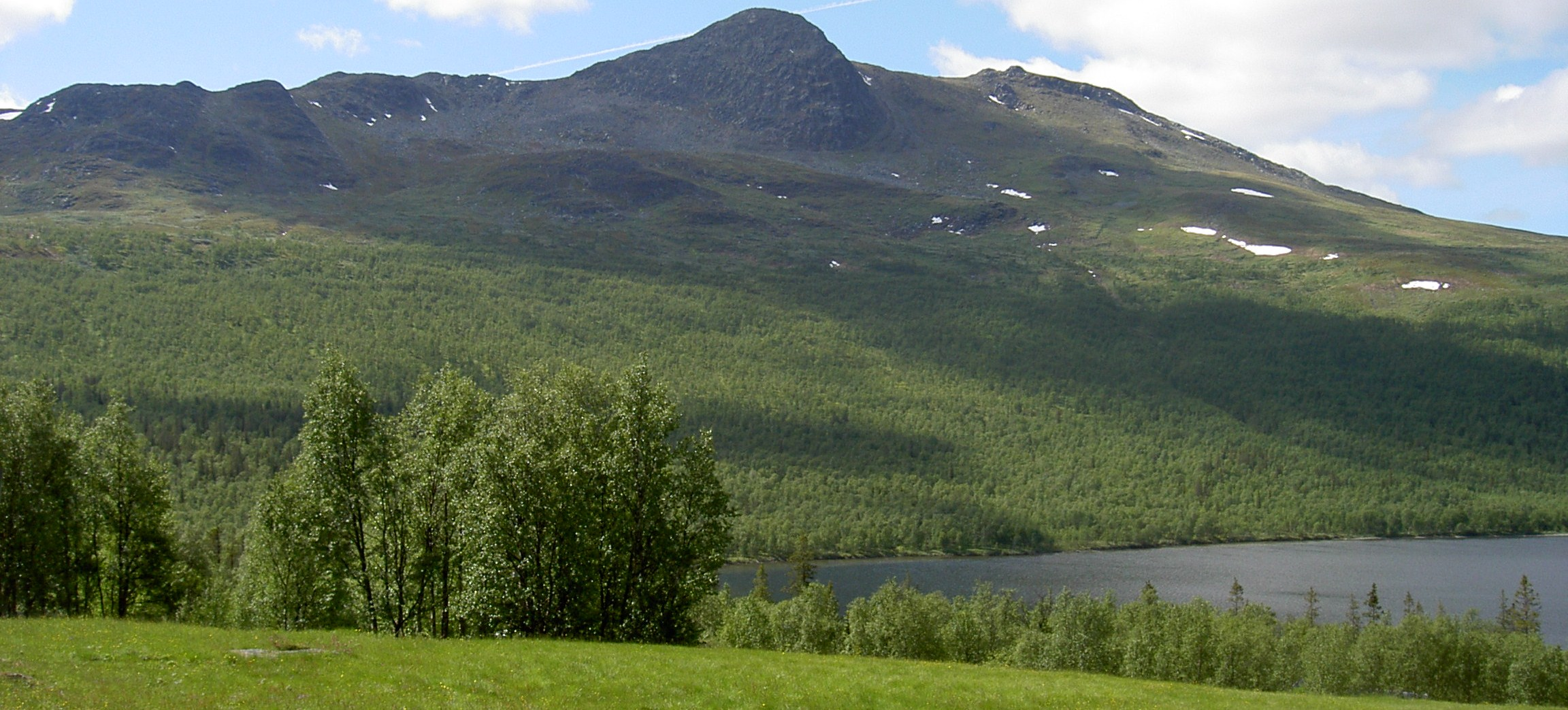 Daunatjåkko och sjön Nedre Fättjaur